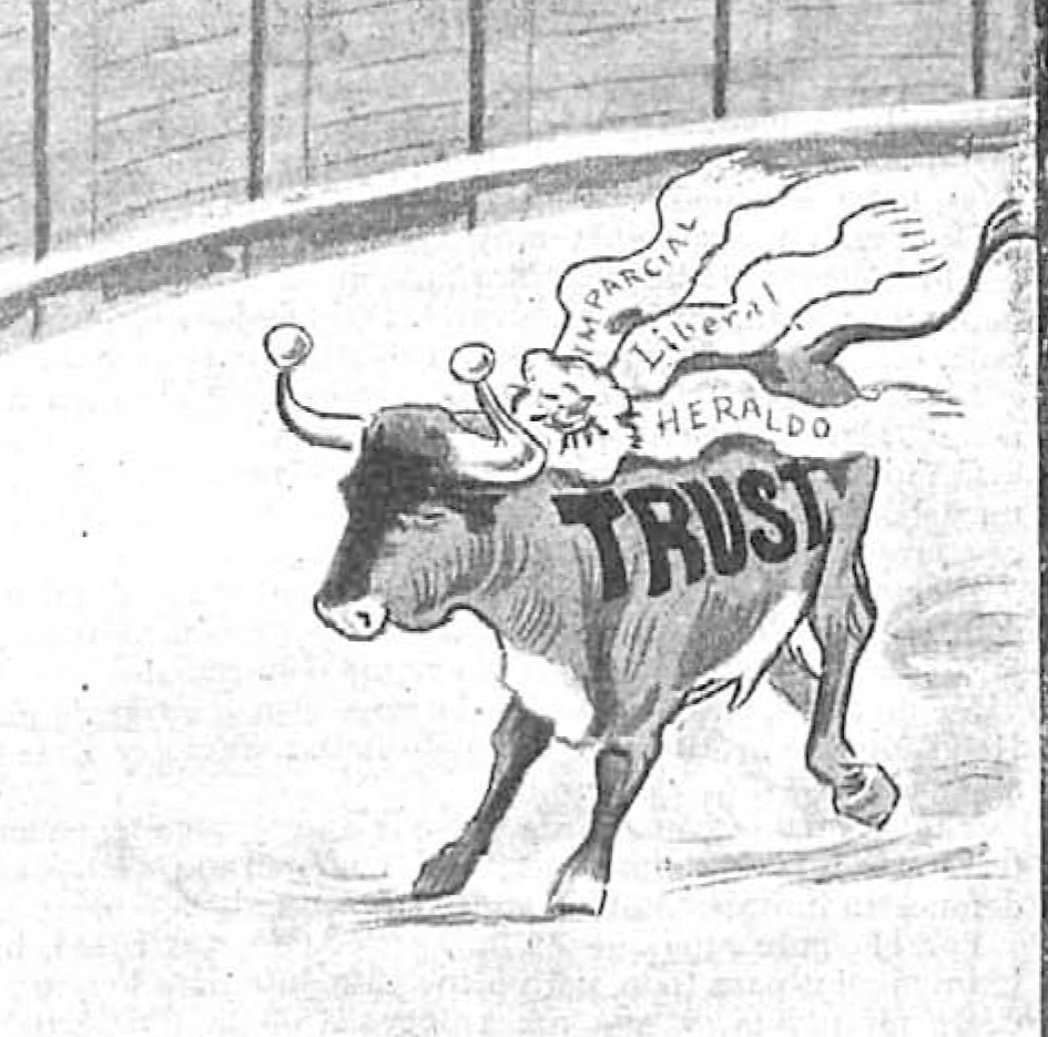 La corrida de la prensa.